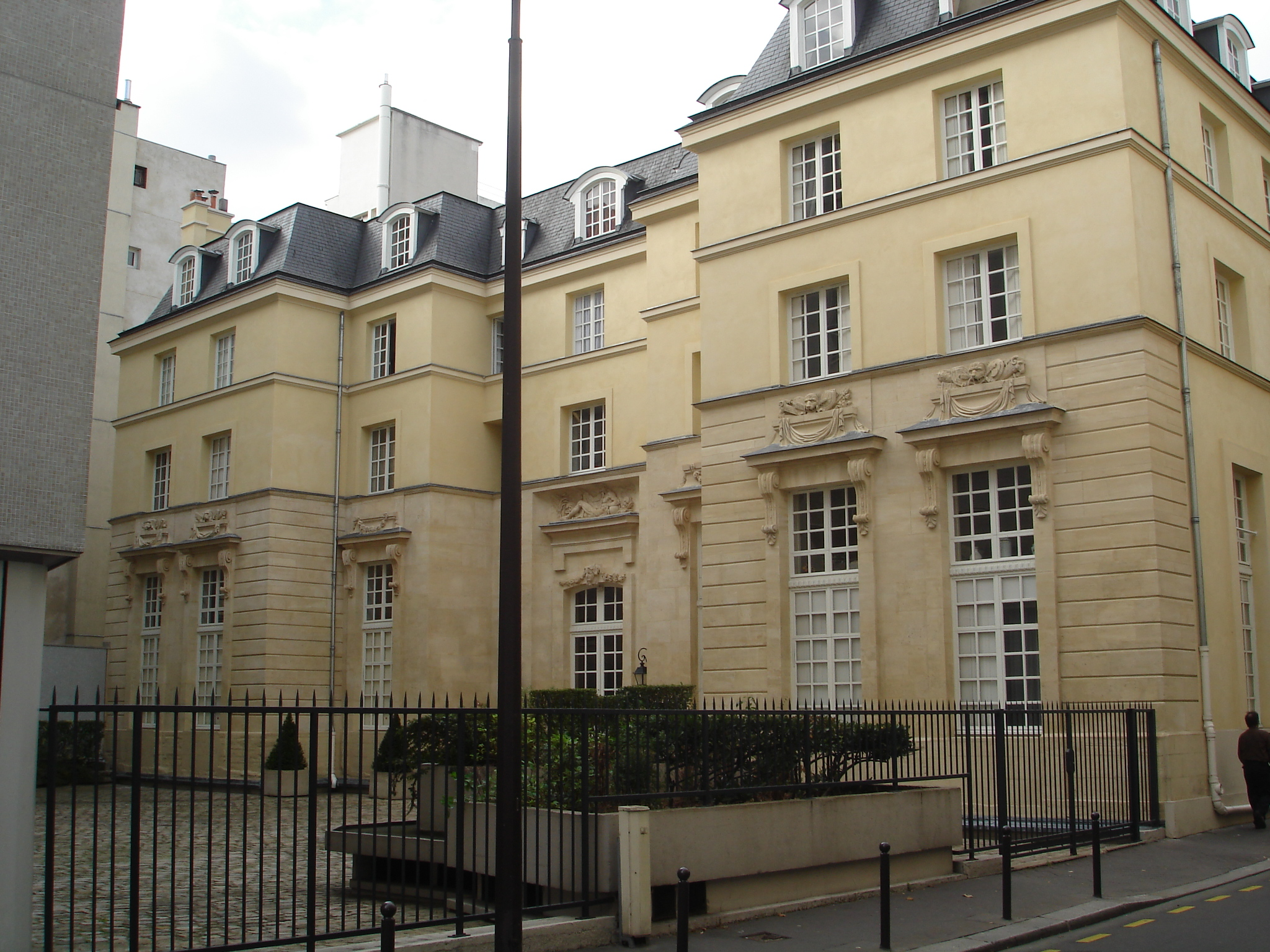 Hôtel de Mortagne, rue de Charonne, Paris 11